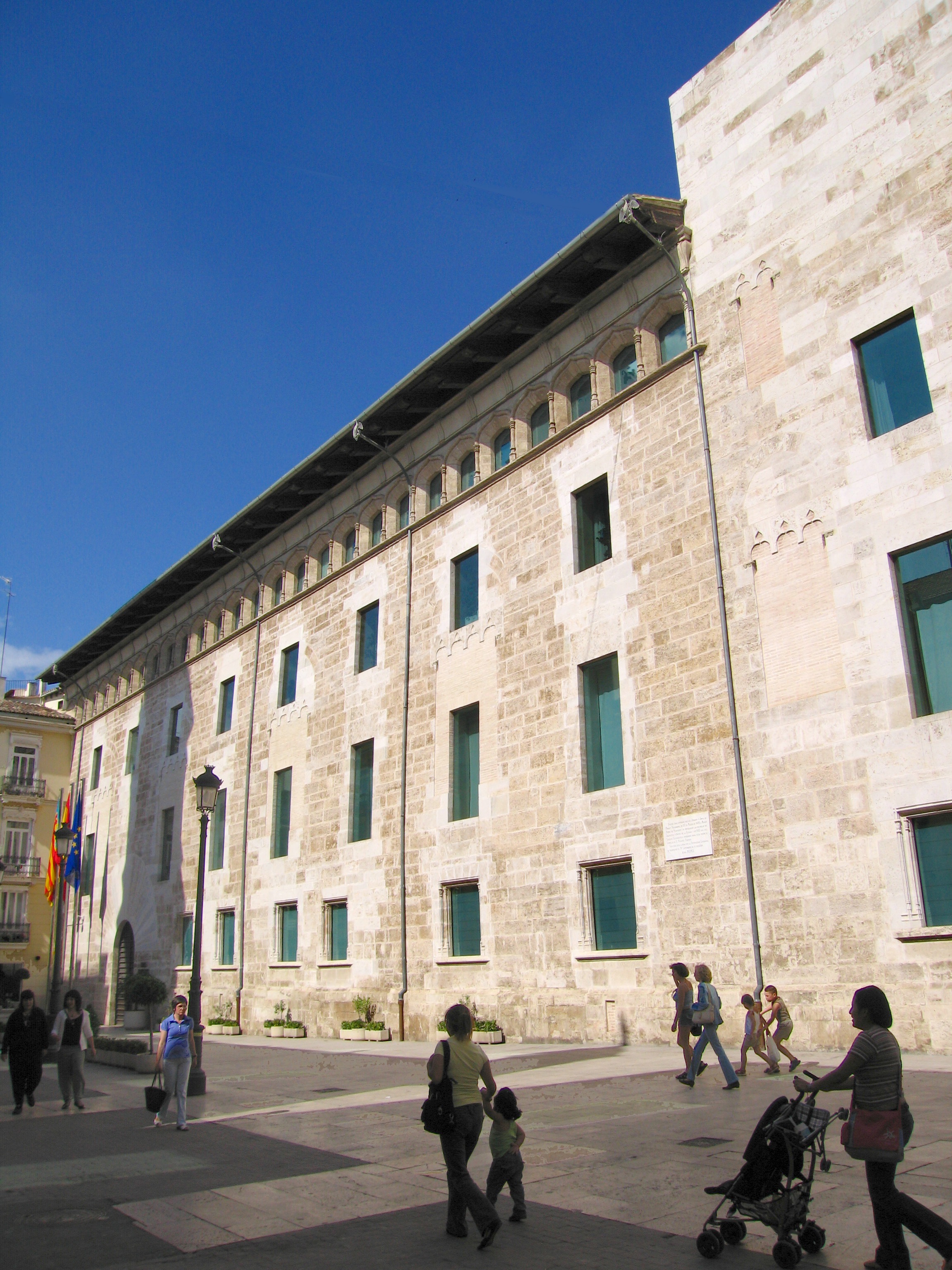 Seu de les Corts Valencianes